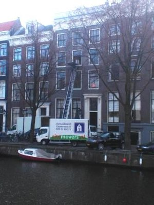 moving company